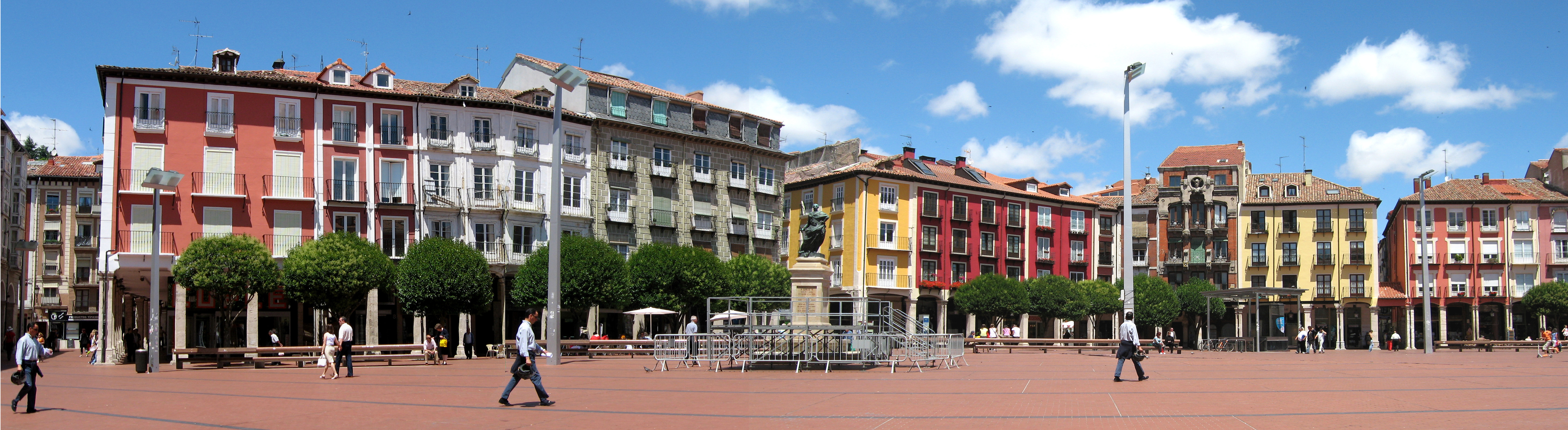 Parte norte-noroeste de la Plaza Mayor de Burgos.